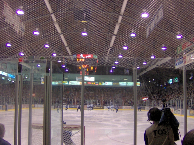 Centre Georges-Vézina, Chicoutimi, Québec, Canada Match demi-finale Saguenéens de Chicoutimi contre l'Océanic de Rimouski